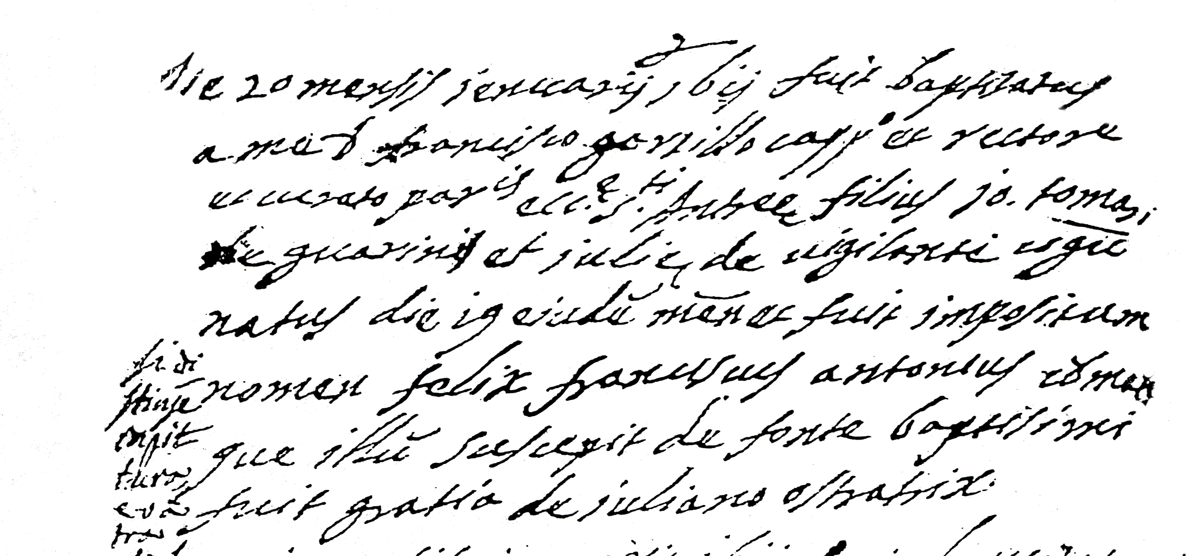 Atto di battesimo di Francesco Guarini conservato presso l'archivio parrocchiale di Sant'Agata Irpina